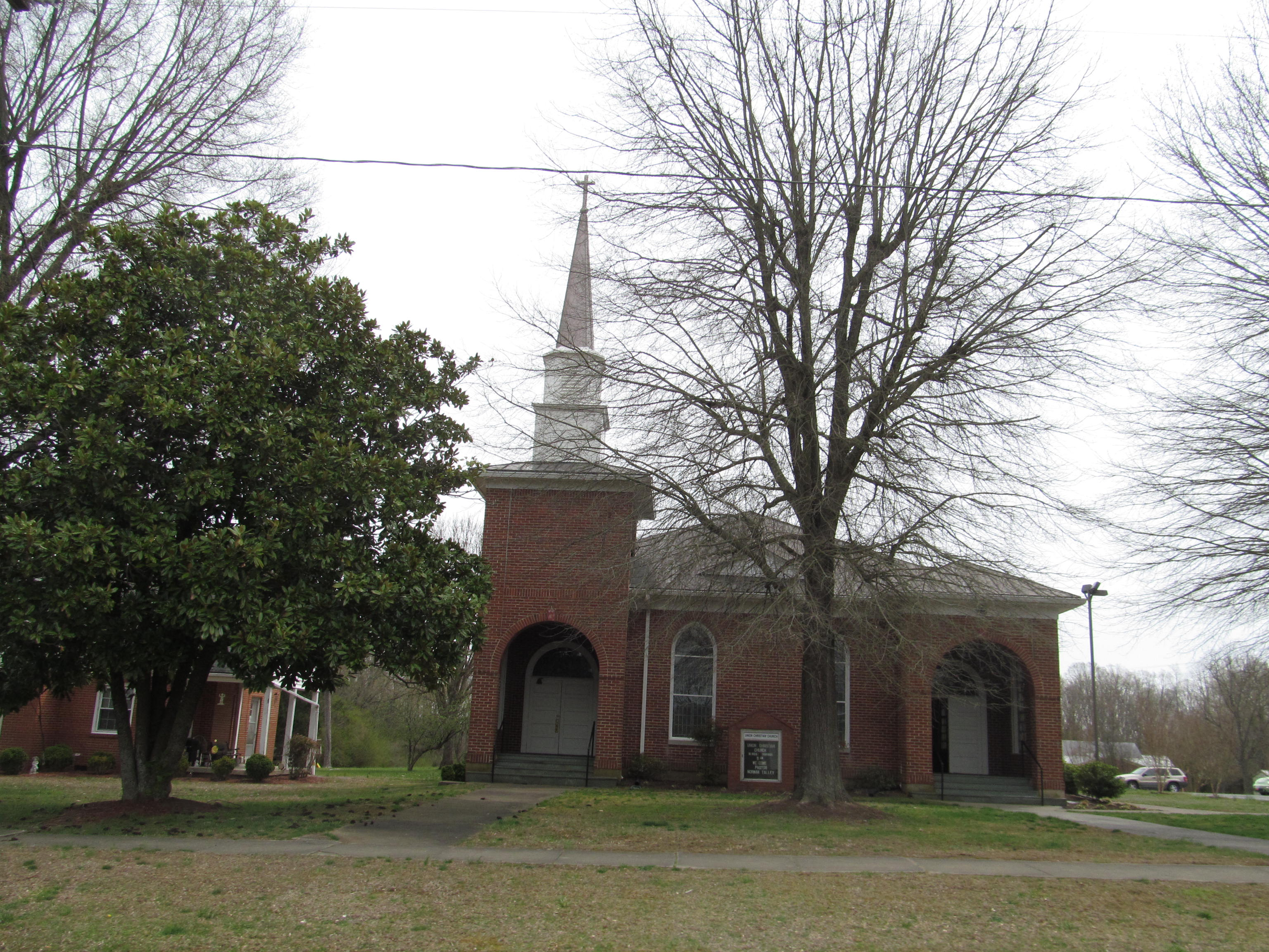 Virgilina, Virginia